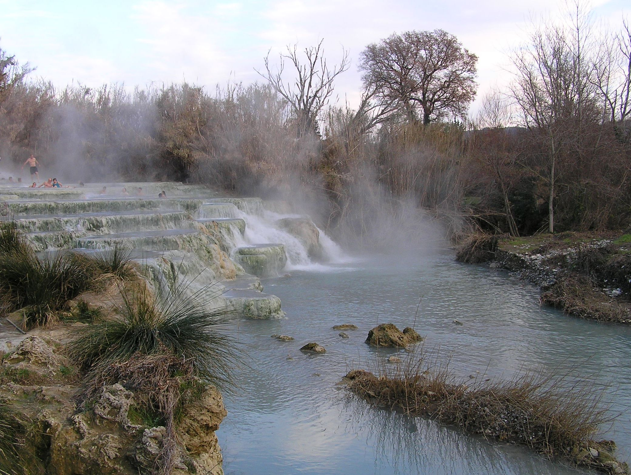 Wasserfall des Gorello (Saturnia, Toskana/Italien)